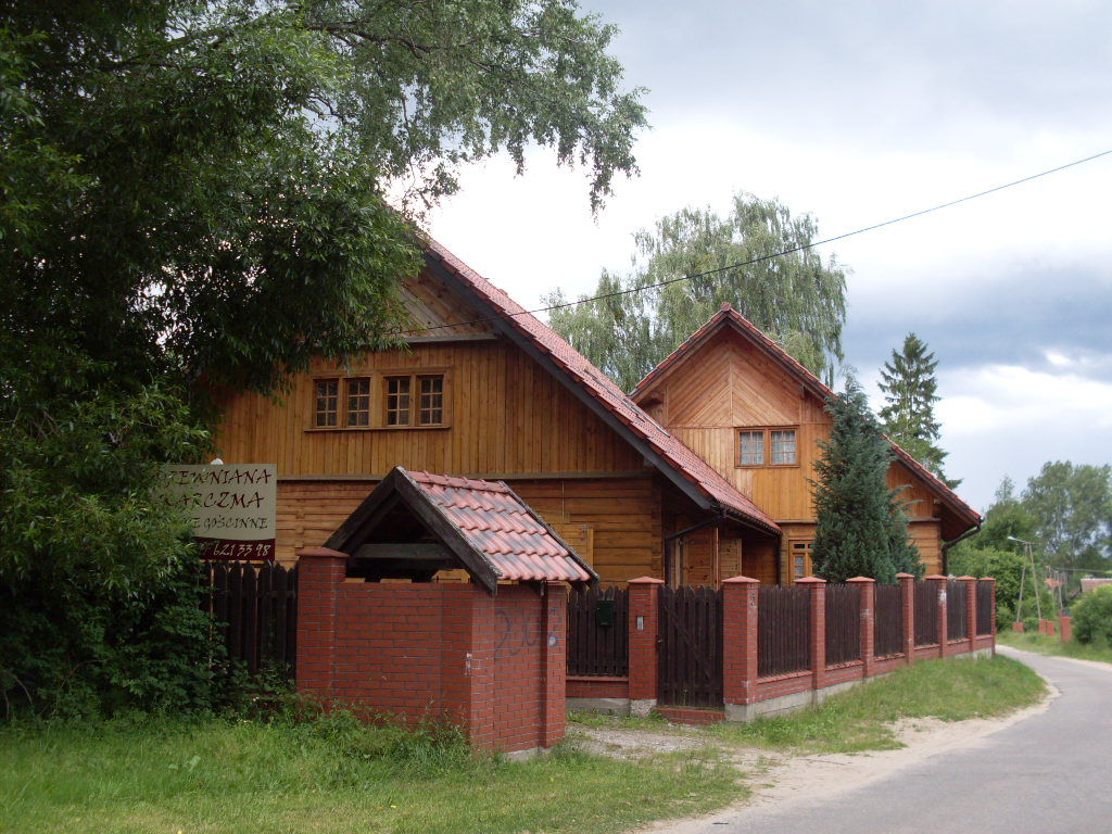 Karczma z zajazdem z XVIII/XIX wieku w Małszewie - po renowacji